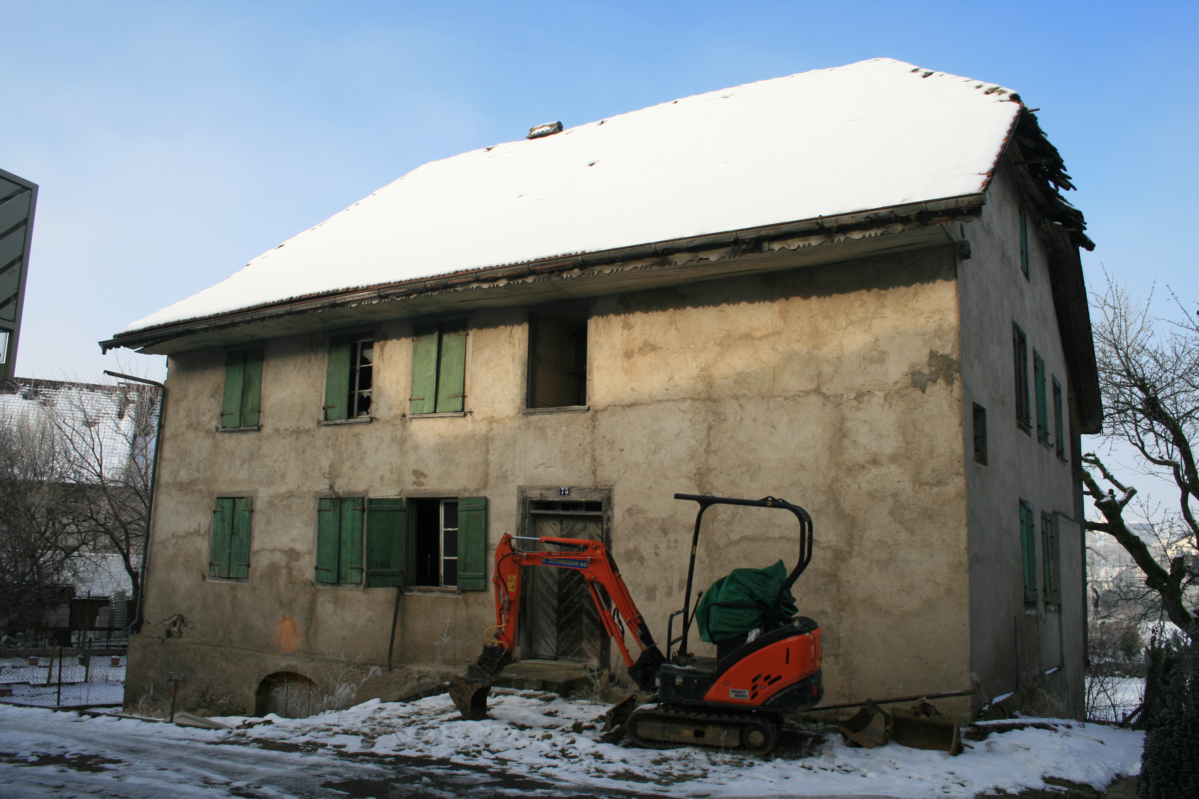 Mazzenbäckerei kurz vor dem Abriss, Lengnau AG